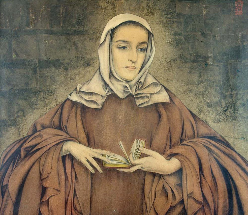 Le livre de prière